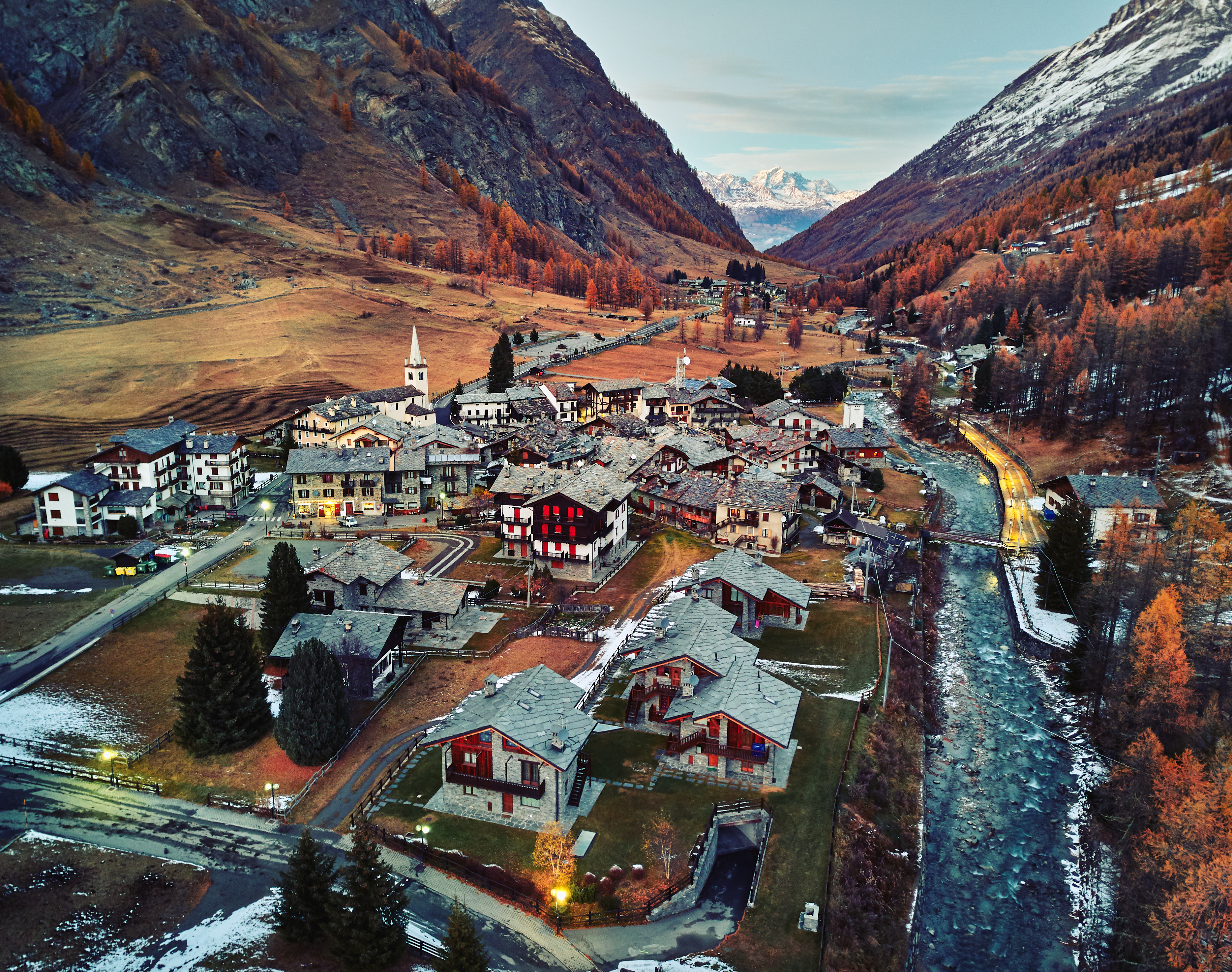 Bruil, Rhemes Valley